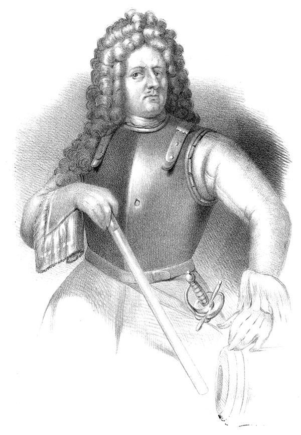 Otto Wilhelm Königsmarck (1639-1688)